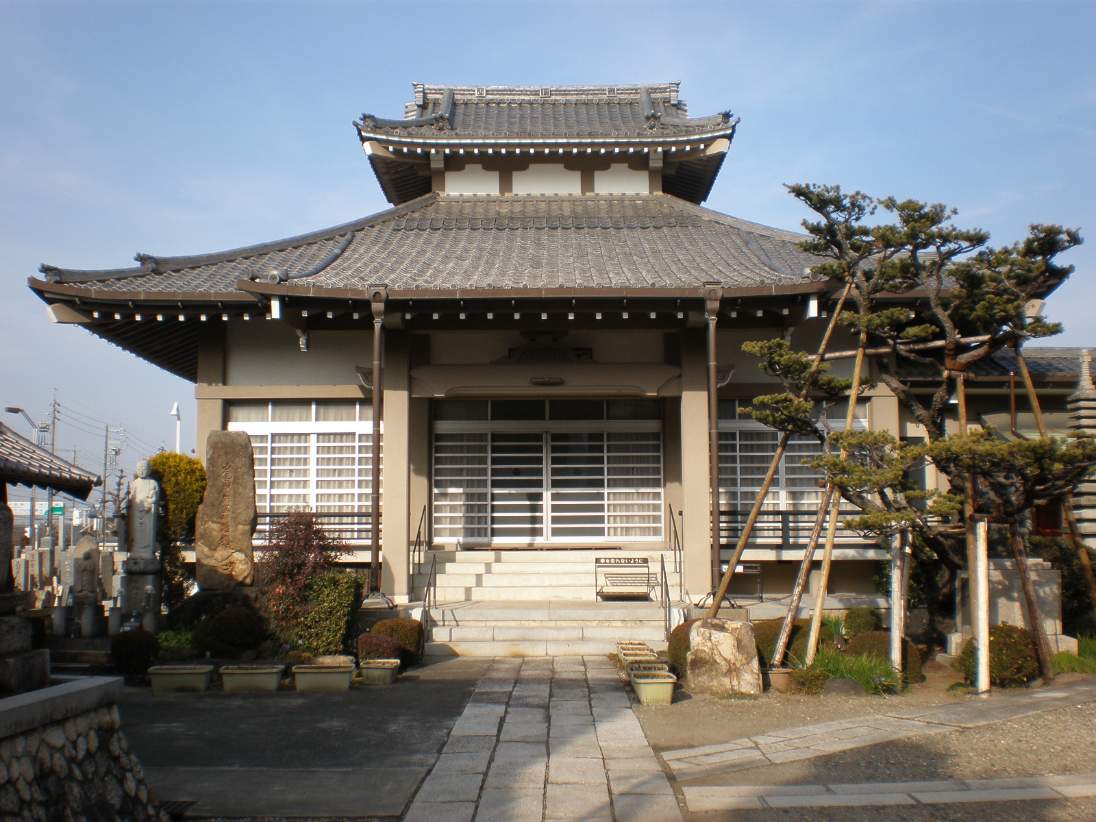 愛知県小牧市にある西林寺の本堂